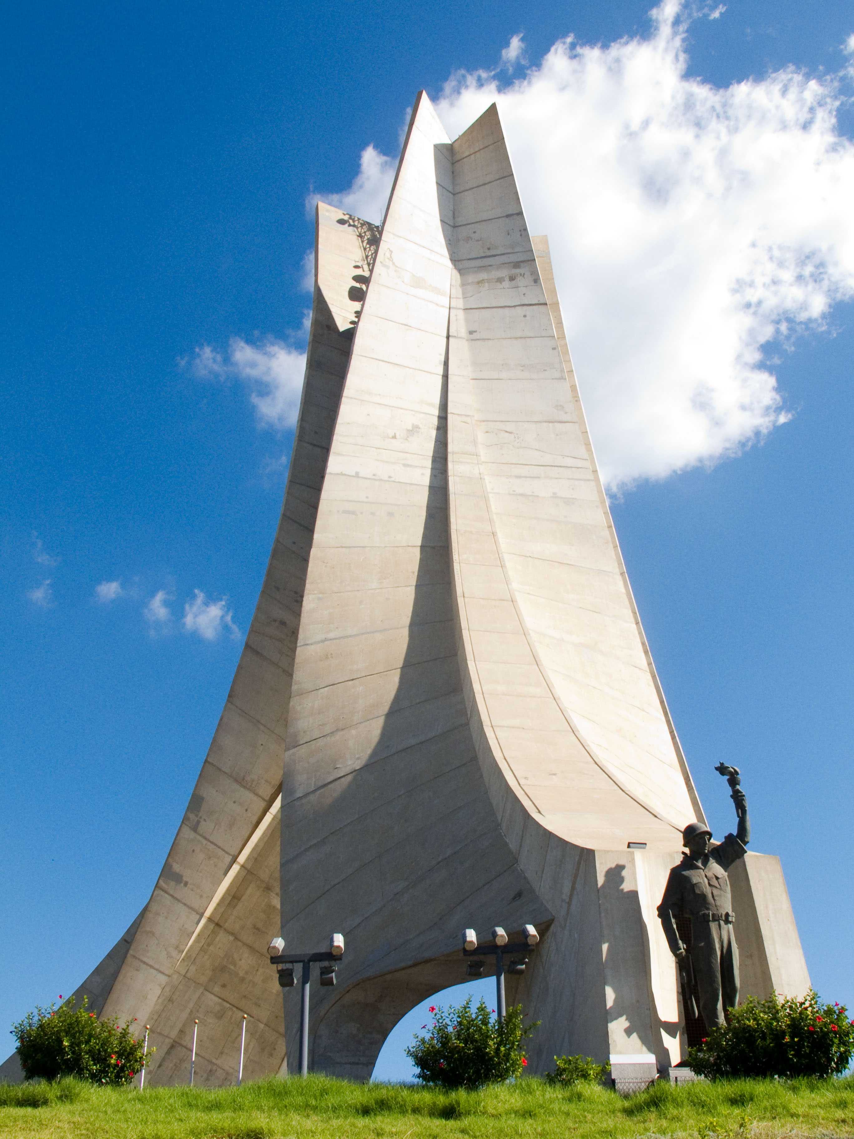 Mémorial du Martyr, Alger, Algérie